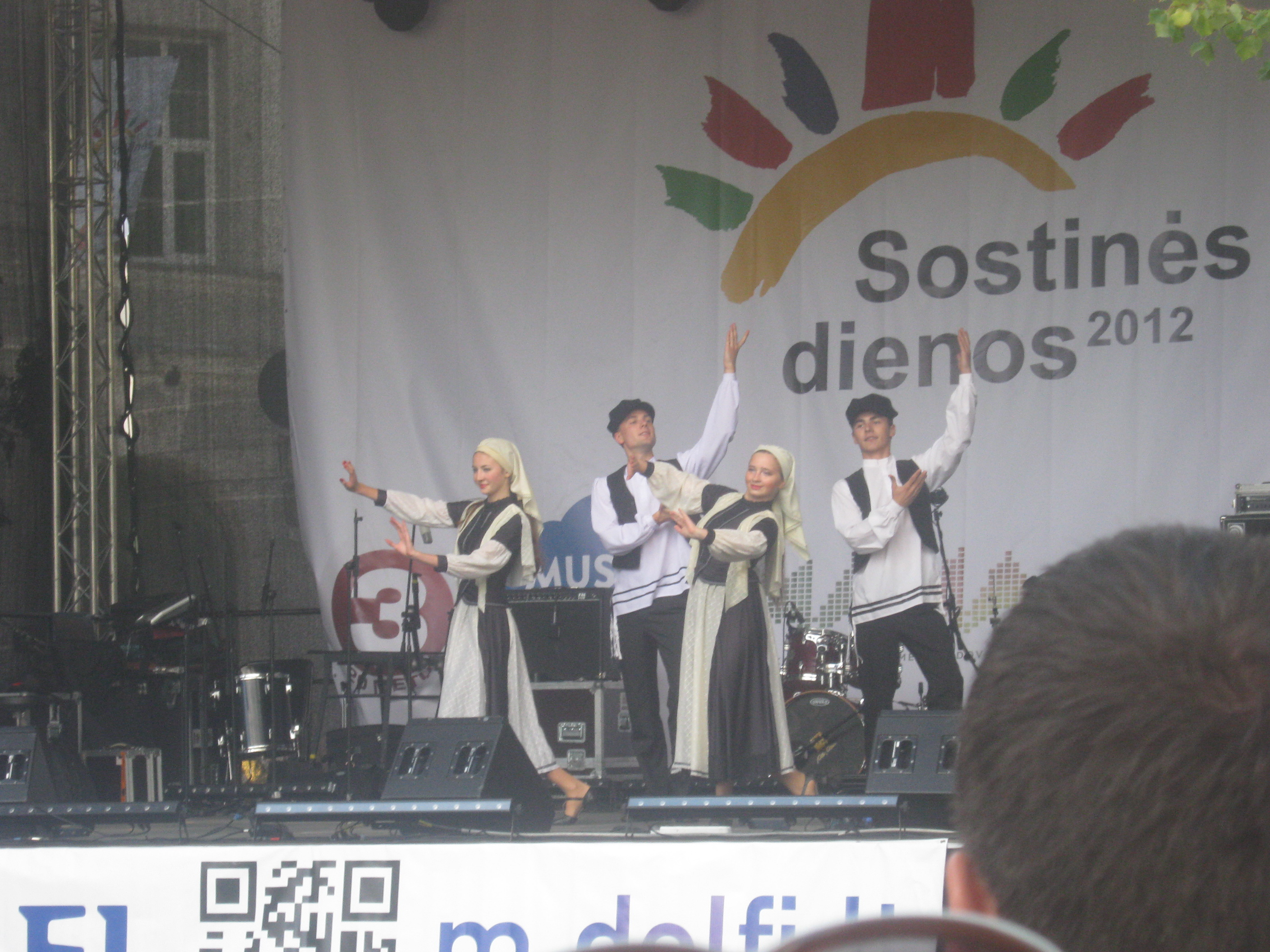 Fajerlech - Sostinės dienos 2012